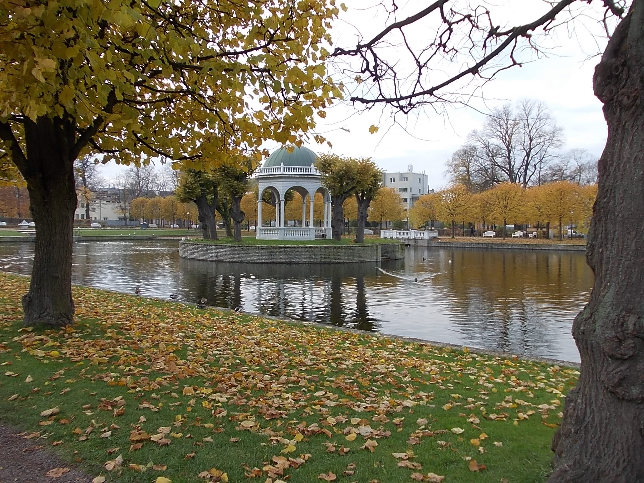 Kadriorg